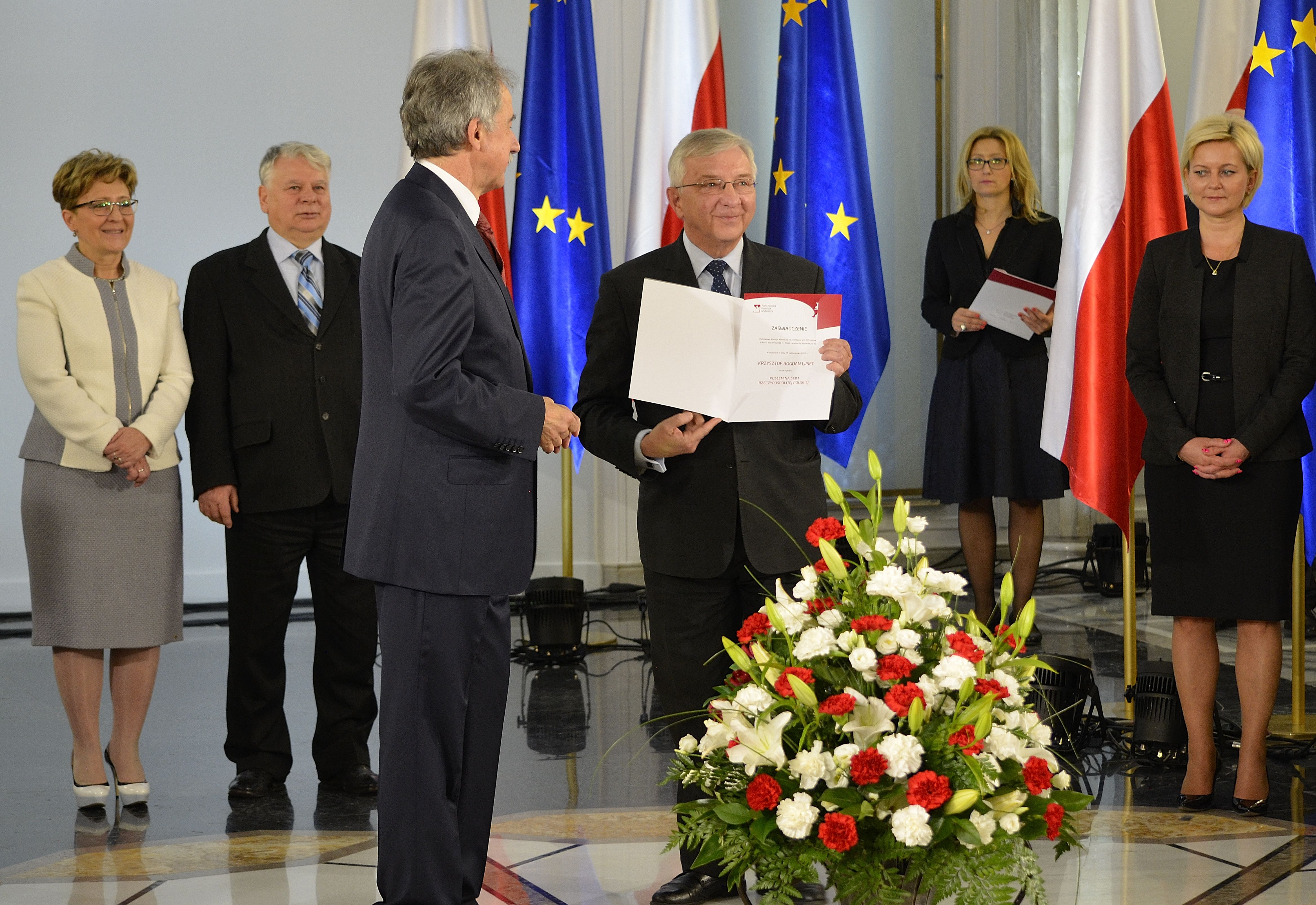 Poseł Krzysztof Lipiec podczas uroczystości wręczenia zaświadczeń o wyborze nowo wybranym posłom w Sali Kolumnowej Sejmu